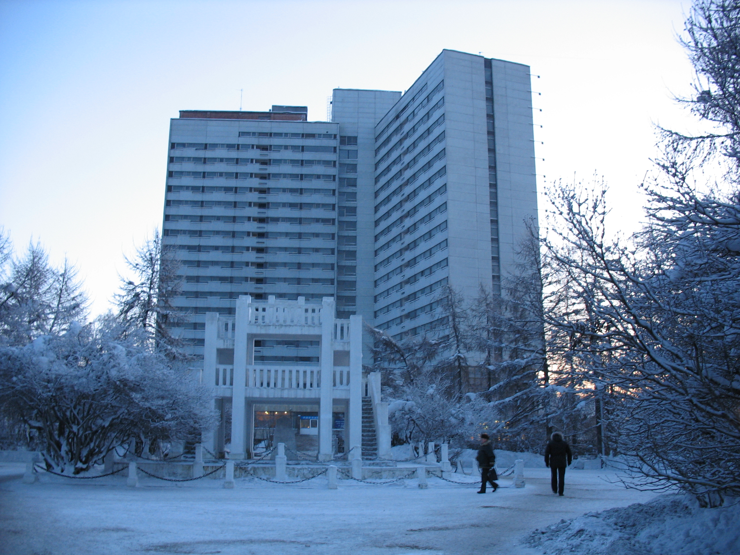 Сквер на ул. Ленинградской: в границах улица Ленинградской, улица Коминтерна, здания № 13 по улица Коминтерна, здания № 26 по улица Ленинградской, здания № 24 по улица Ленинградской, Мурманск, Мурманская область